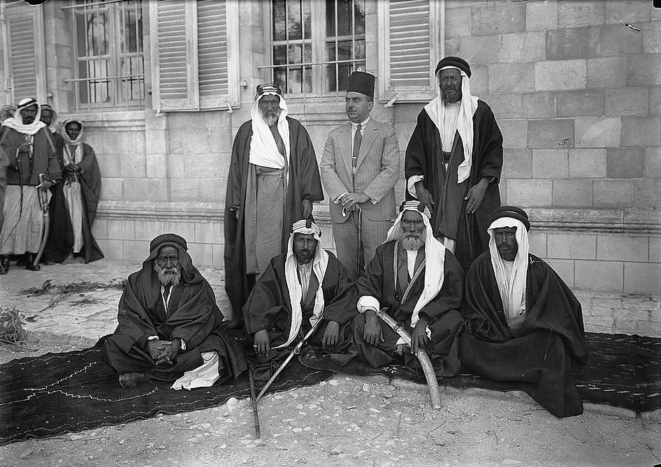 השייכים של שבט חנאג'רה. בינהם מושל נפת באר שבע, עארף אל-עארף